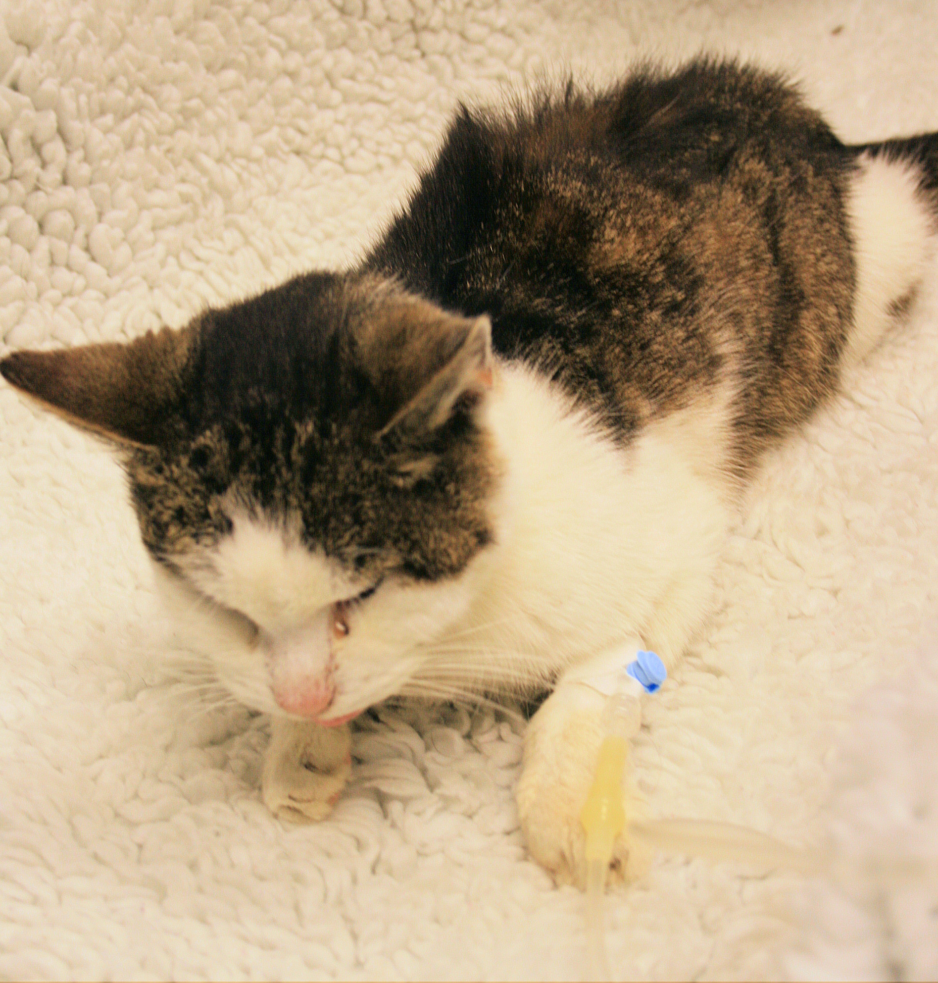 Katze mit hochgradiger CNI, Urämie, Nierenversagen, Endstadium.